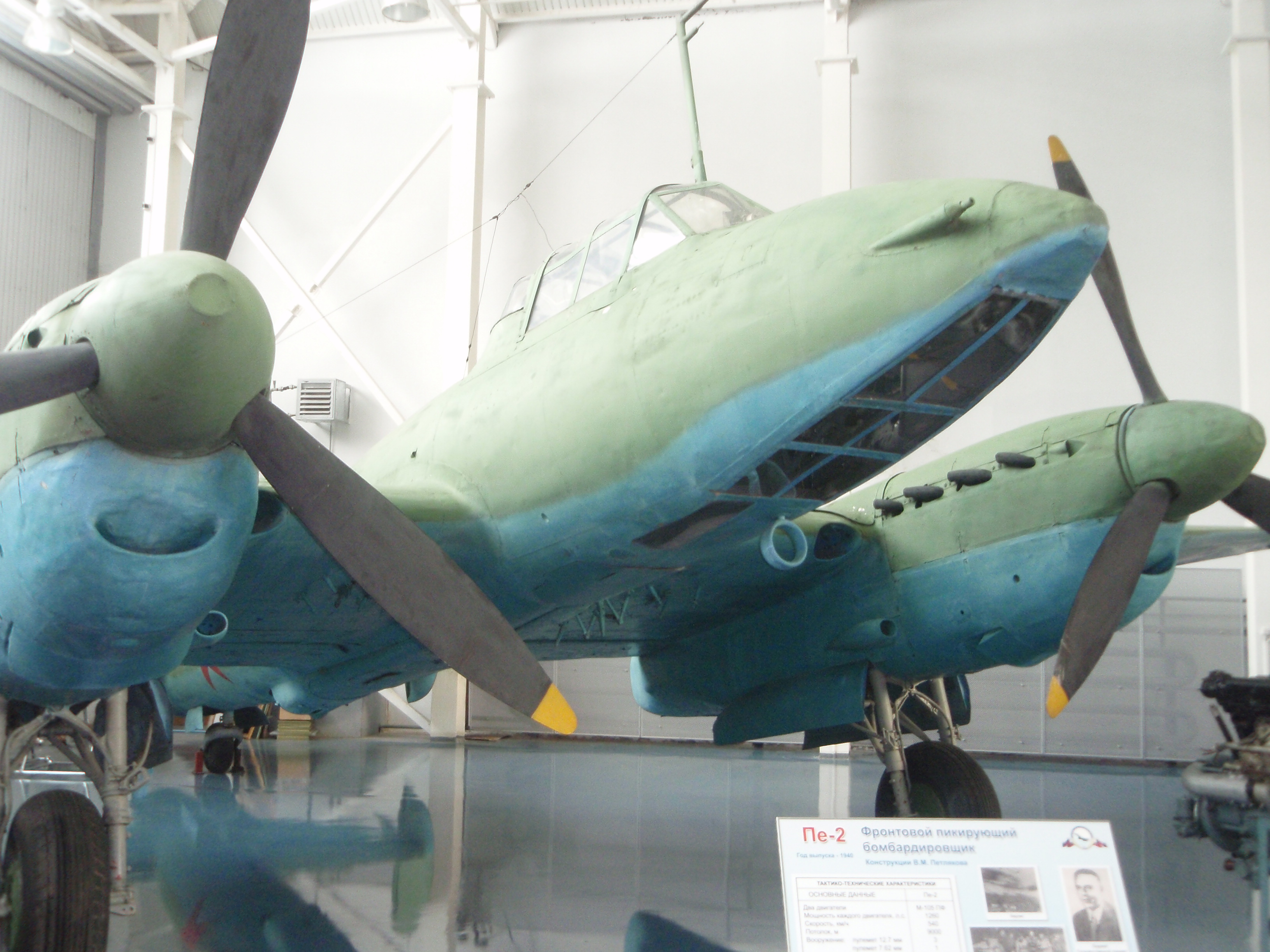 Советский пикирующий бомбардировщик Пе-2